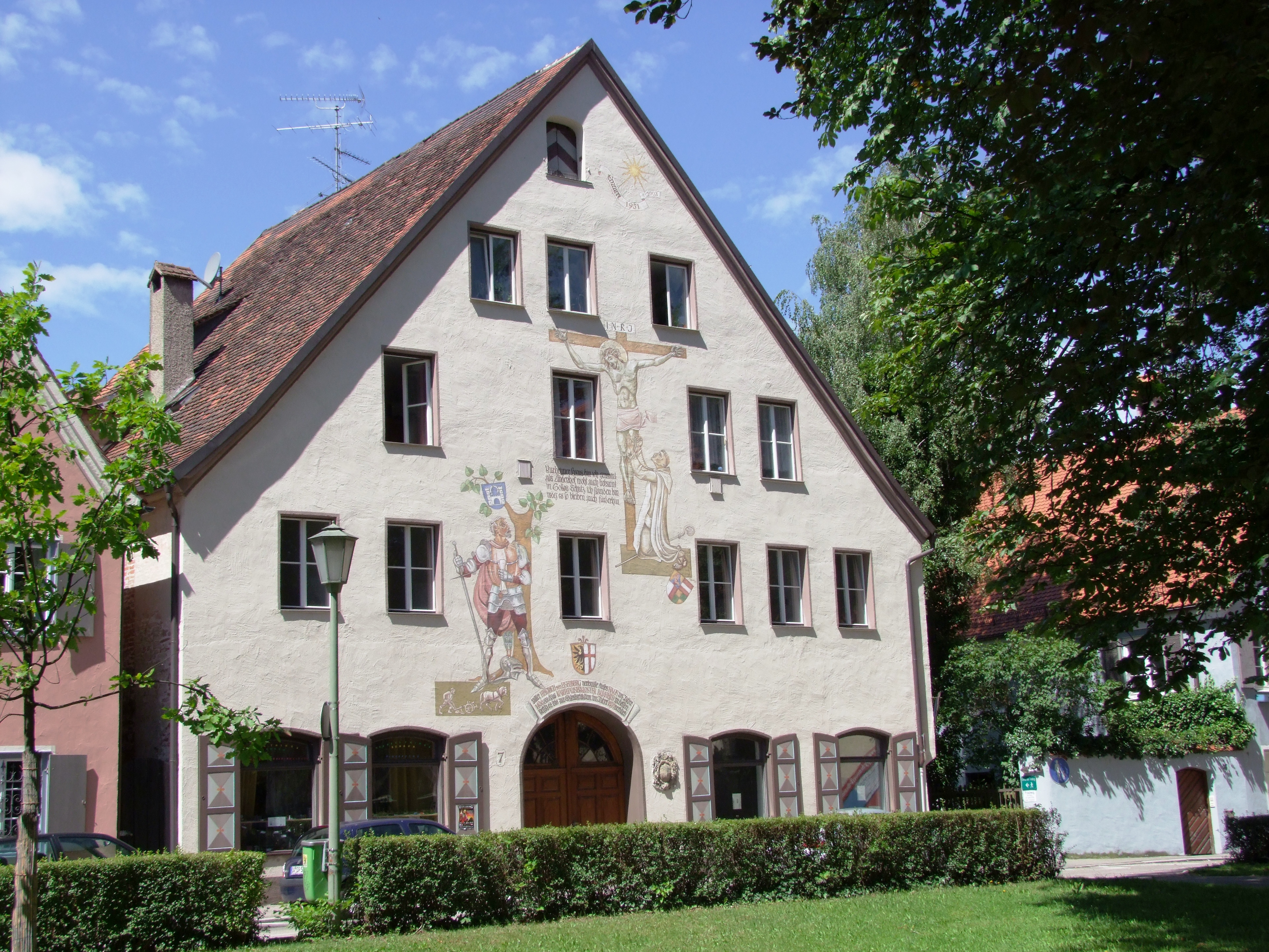 Das Buxheimer Haus in Memmingen am Martin-Luther-Platz vor der St. Martinskirche